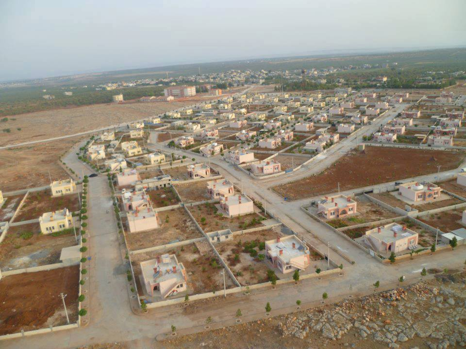 Argıl,Halfeti